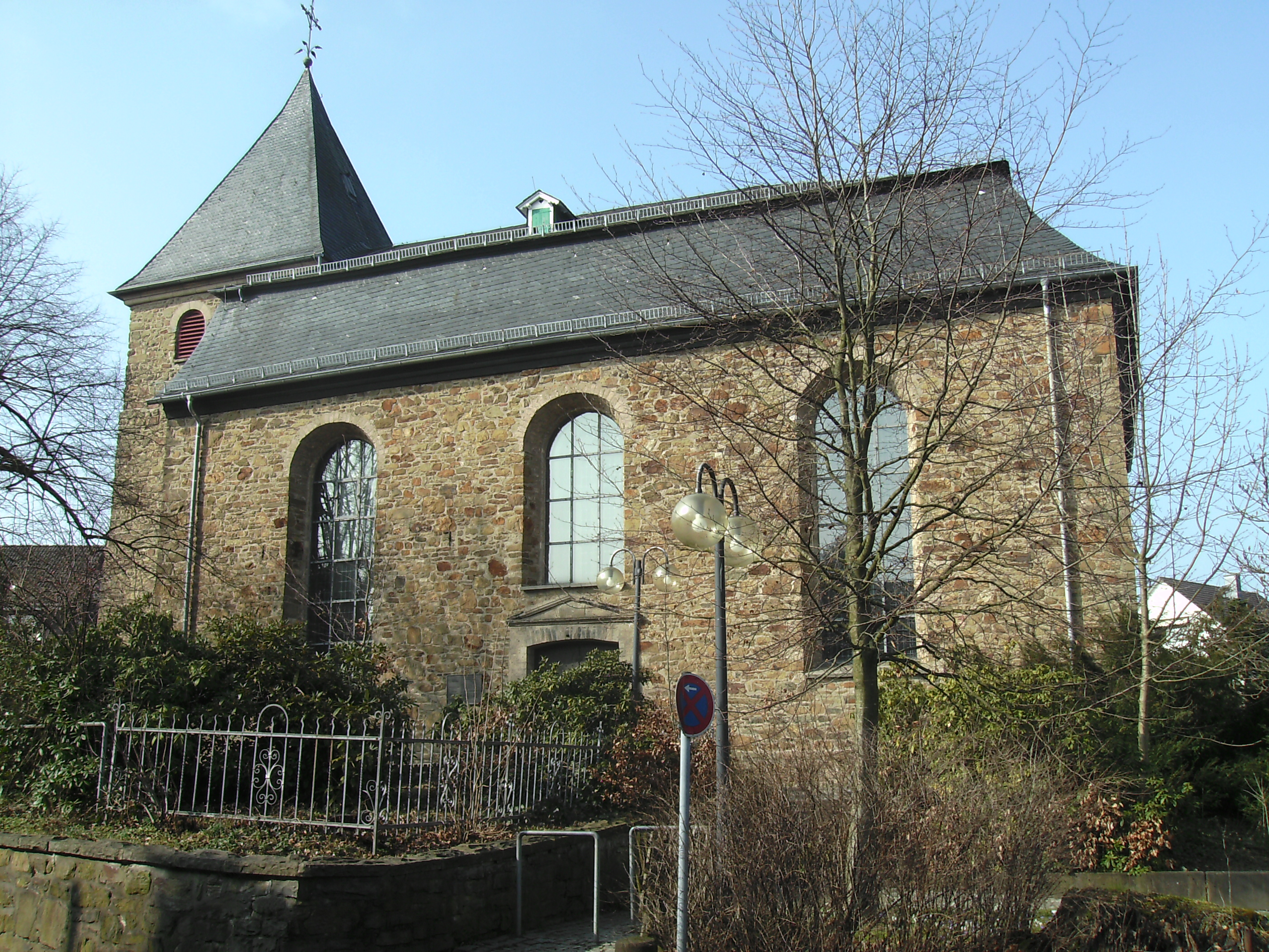 Die evangelische Kirche in Witzhelden, einem Stadtteil von Leichlingen (Rheinland).